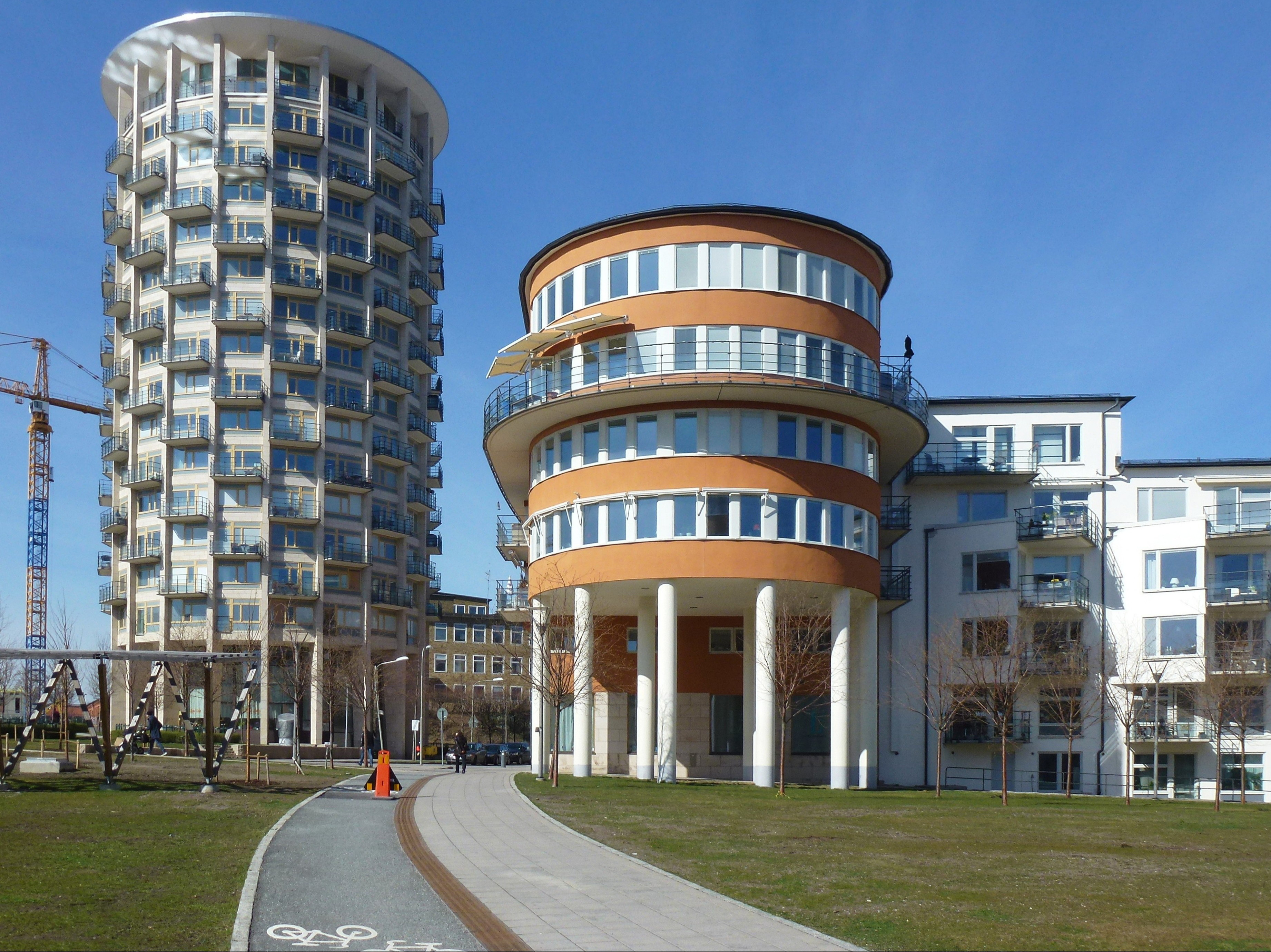 Svea torn med byggnader i Starrbäcksängen till höger